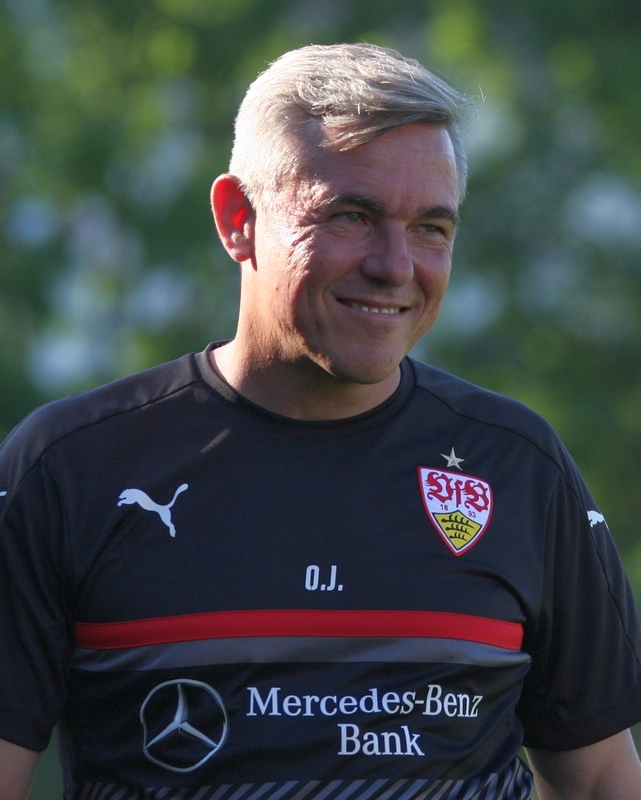 Olaf Janßen beim Auftakttraining des VfB. Aufgenommen von